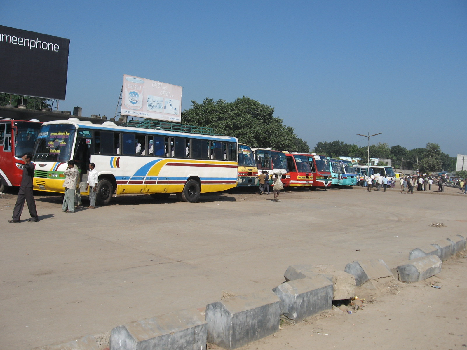 Bus stand at Tangail